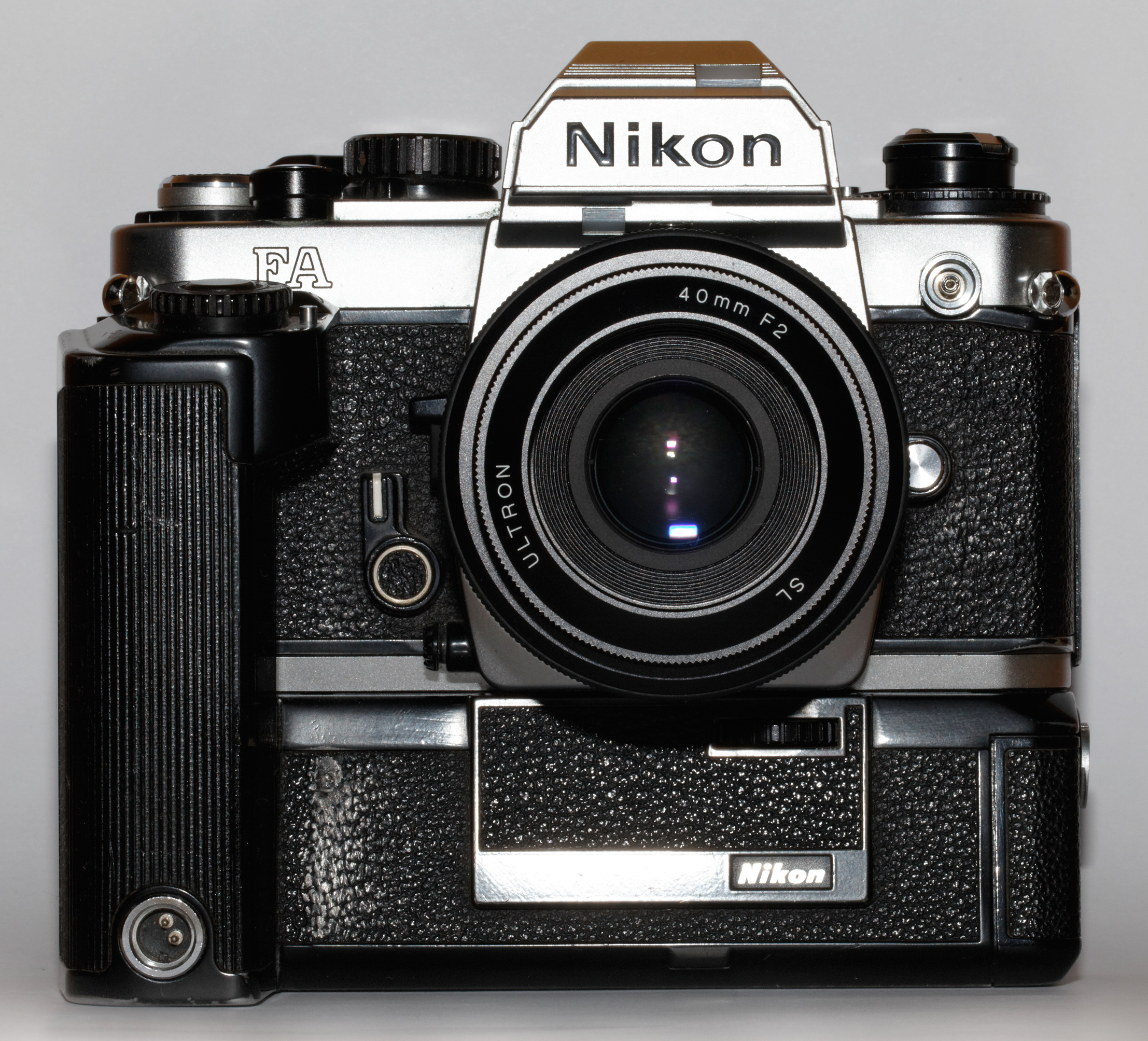 Nikon FA mit Voigtländer Ultron 2/40mm Objektiv und Motor-Drive MD-15